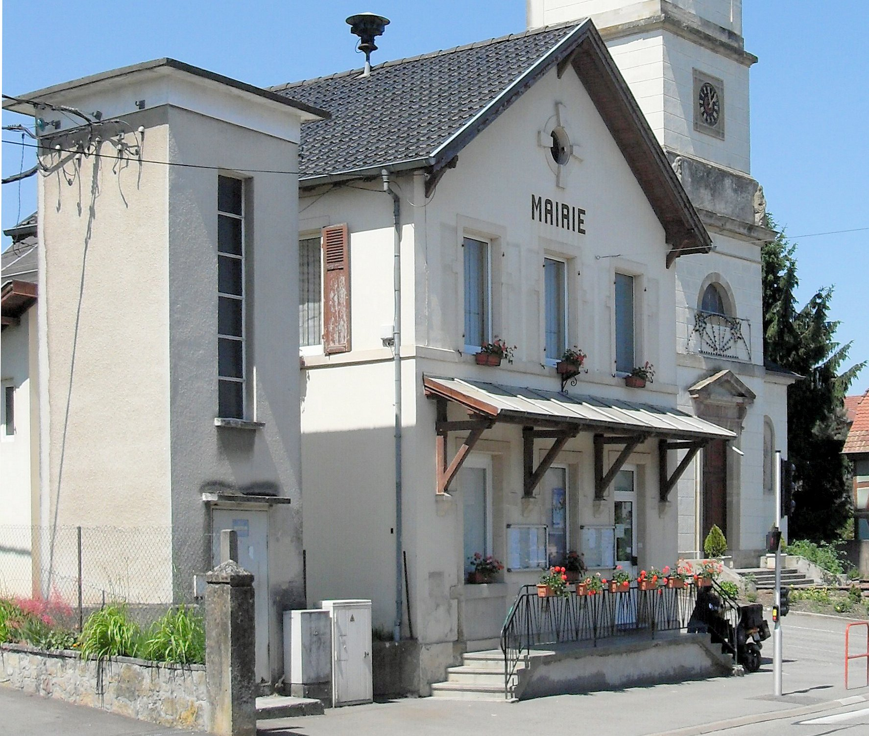 L'ancienne mairie de Spechbach-le-BasHaut